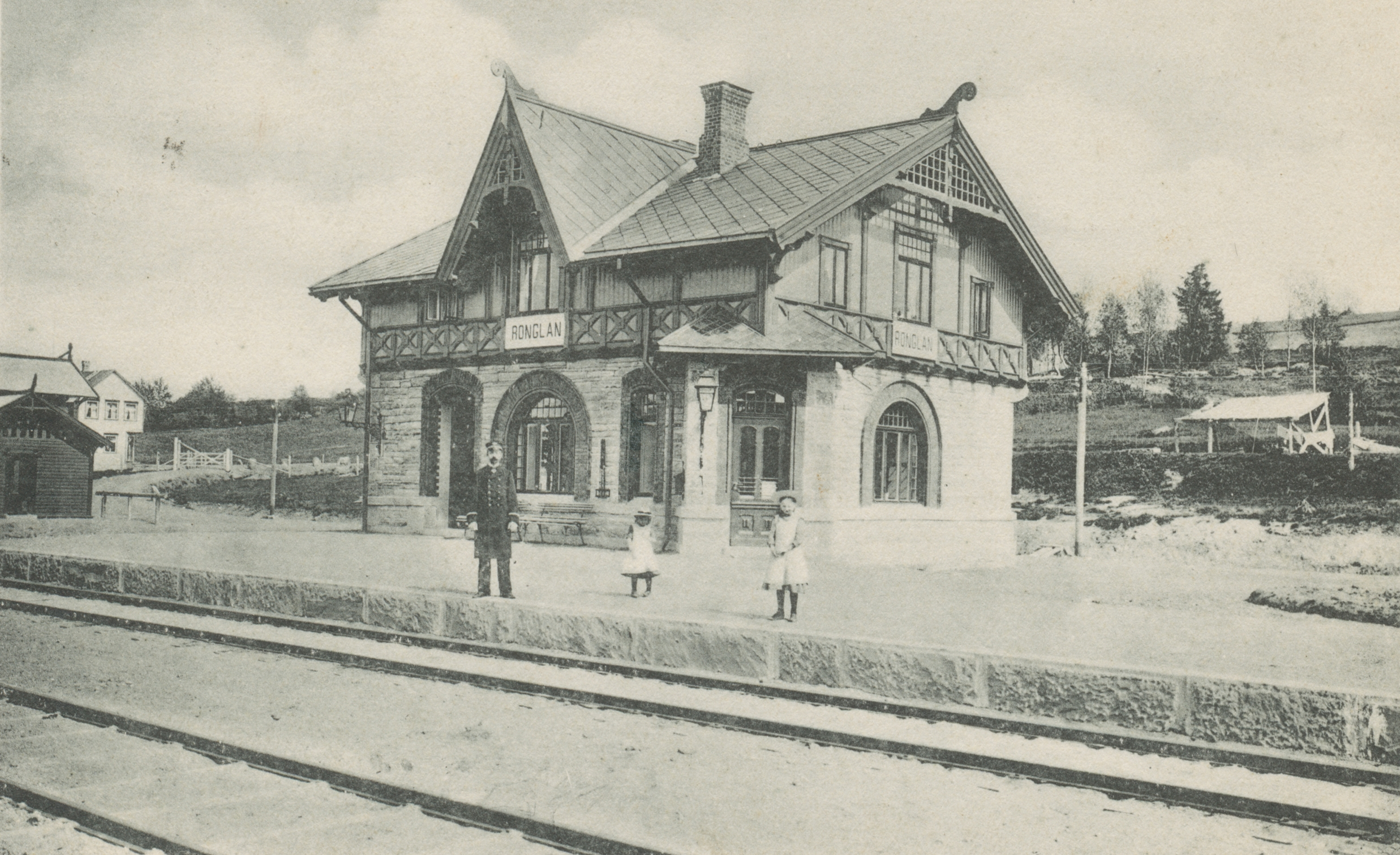 Ronglan stasjon, trolig kort tid etter at jernbanen ble åpnet (1902). Fotograf / Photographer: Ukjent Fotoeier / Photo owner: Johannes Naavik Digitalisering / Digitizing: Arne Langås (2009) Foto-ID / Photo ID: 043-0547 Hvis bildet gjengis i andre sammenhenger, oppgi Åsen Museum og Historielag, fotoeier og fotograf som kildereferanse. Har du utfyllende opplysninger? Legg gjerne igjen en kommentar nedenfor eller send e-post til . | If you re-use this photo, please refer to Åsen Museum og Historielag, the photographer and the owner of the photo. Do you have additional information? Please leave a comment or send an e-mail to .